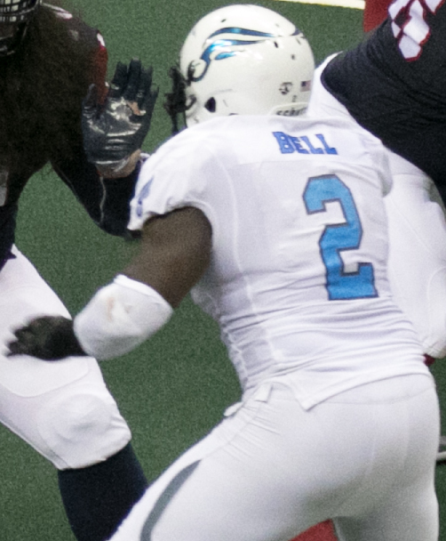 Valor 47 / Philadelphia Soul 48